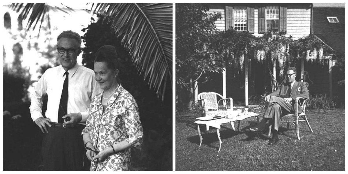 wierzynski-photo